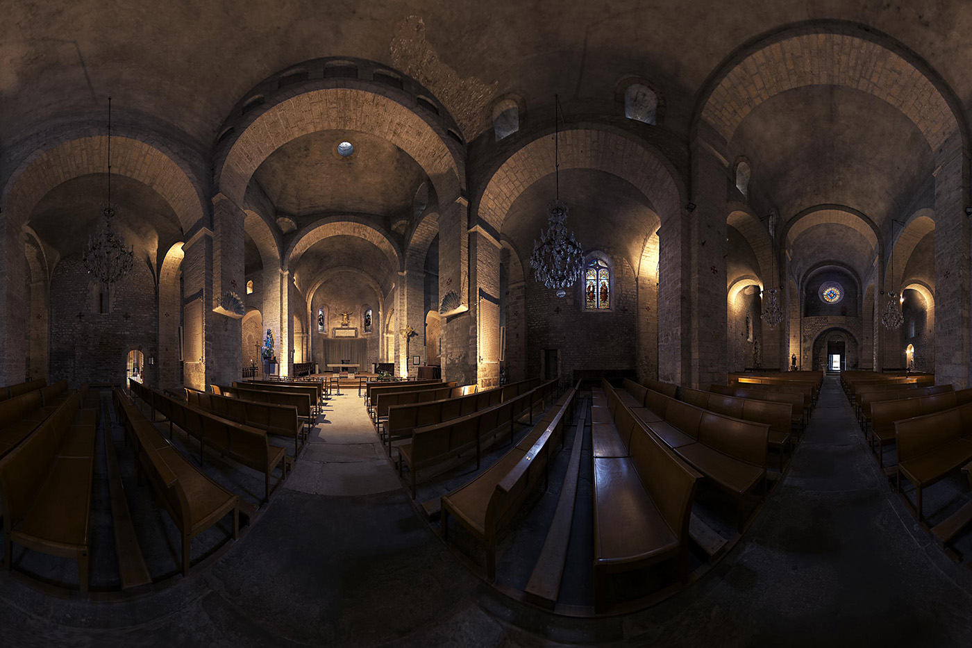 Vue panoramique 360° de l’intérieur de l'église de l'Assomption-de-Notre-Dame à Quarante (France) .